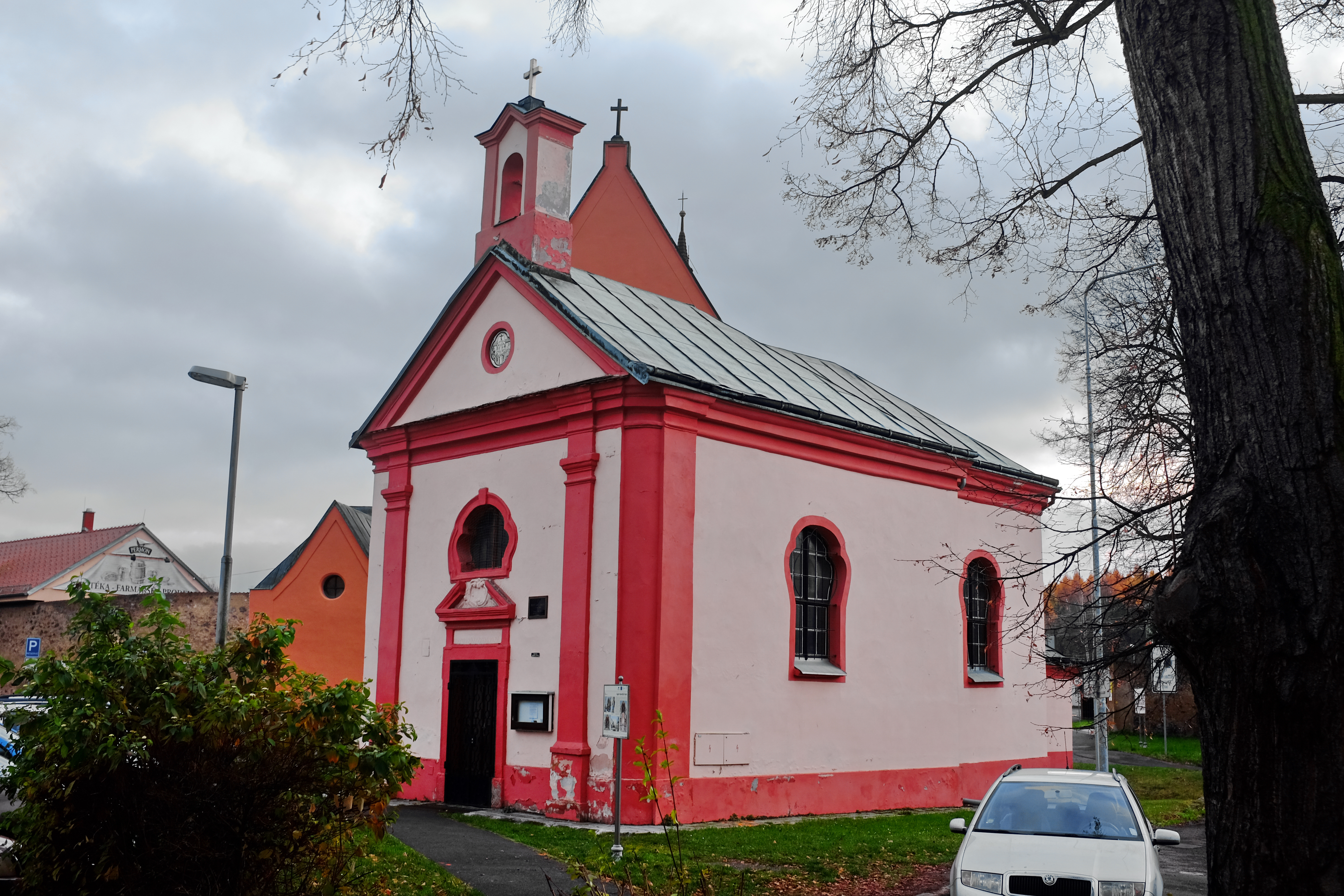 Chrám Nejsvětější Trojice, Komenského, před klášterem kapucínů, Sokolov.